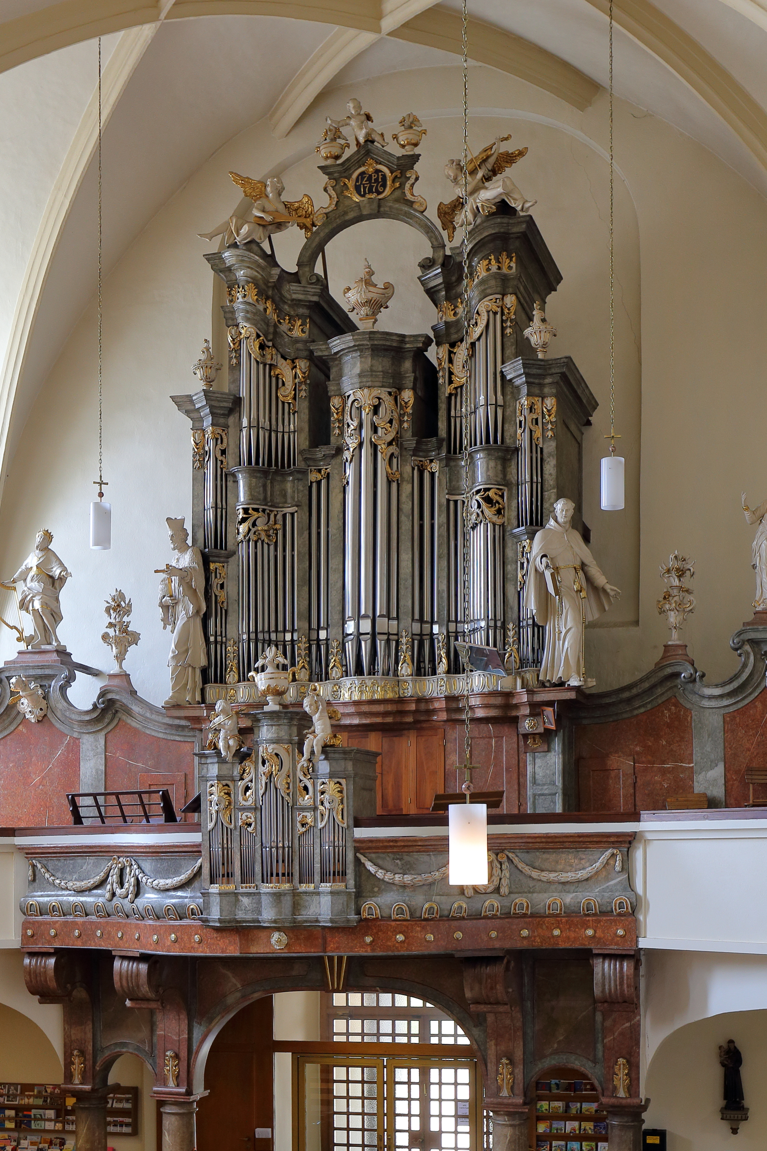 Orgel der Penzinger Pfarrkirche St. Jakob im 14. Wiener Gemeindebezirk Penzing.Die barocke Orgel wurde zwischen 1774 und 1776 aufgestellt. Im Jahr 1866 wurde diese von dem Orgelbaumeister Mathias (Matthäus) Mauracher aus Salzburg umgebaut. Im Zuge der großen Innenrenovierung 1980 erhielt die Orgel durch die Orgelbaufirma M.Walcker-Mayer aus Guntramsdorf im Jahr 1981 ein völlig neues Werk mit 1130 Pfeifen und 18 Register, verteilt auf zwei Manuale und Pedal. Von der ursprünglichen Orgel stammen noch der barocke Oberteil des Hauptgehäuses und die Vorderwand des Rückpositives. Das Gehäuse ist verziert mit Putten und den Statuen König David mit Harfe, dem hl. Nepomuk, dem Ordensgründer hl. Dominikus sowie der hl. Cäcillia. Auf dem bekrönten Bogen über dem Orgelgehäuse befindet sich die Buchstabengruppe „JZ PF 1776“, die sich mit „Josef Zandonatti Parochus Fecit“ (gemacht von Pfarrer Josef Zandonatti) auflösen lässt.